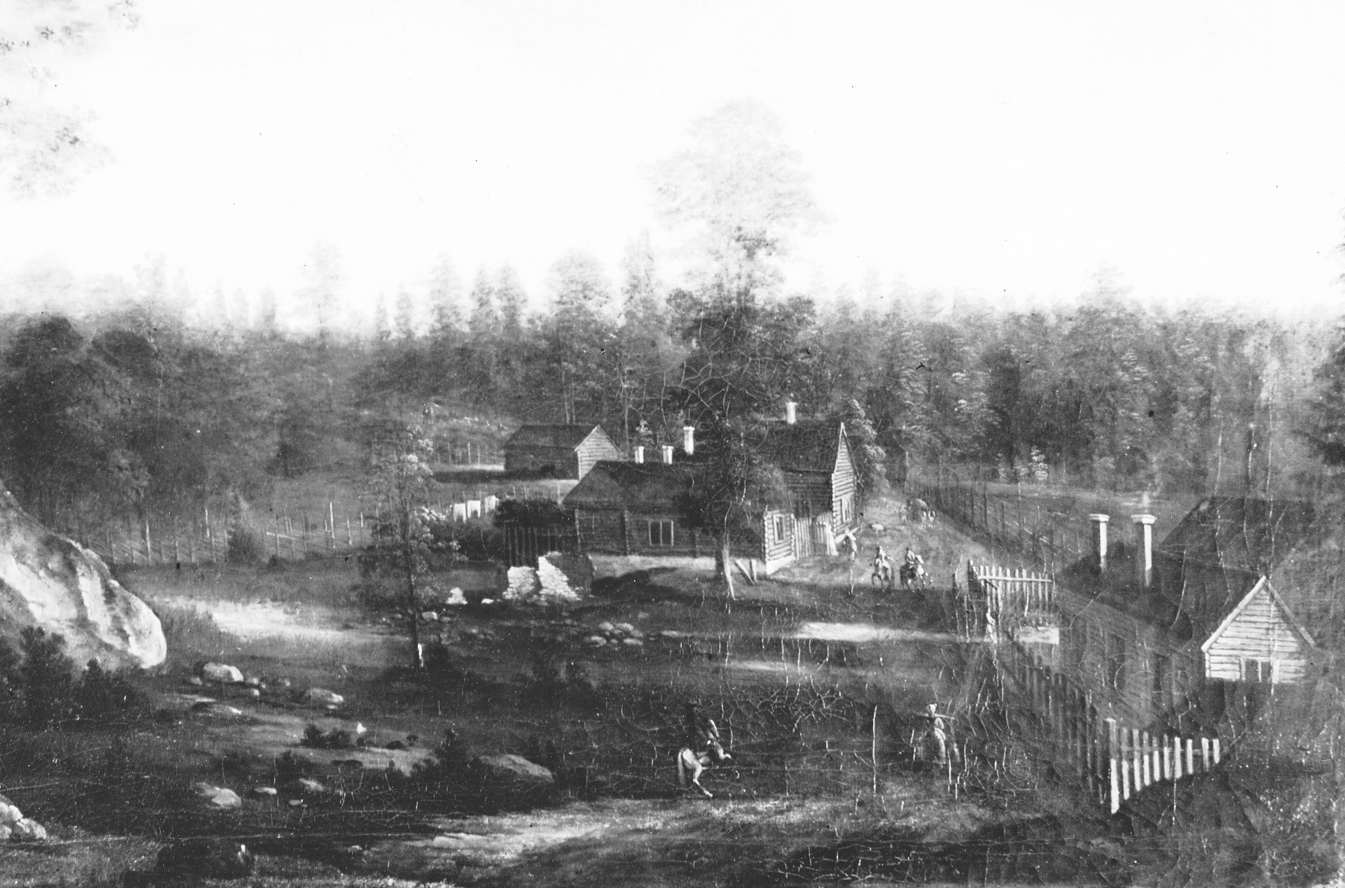 Roslagsvägen vid Ålkistan. Till vänster ses värdshuset Ålkistan och längst ner till höger mjölnarstugan.